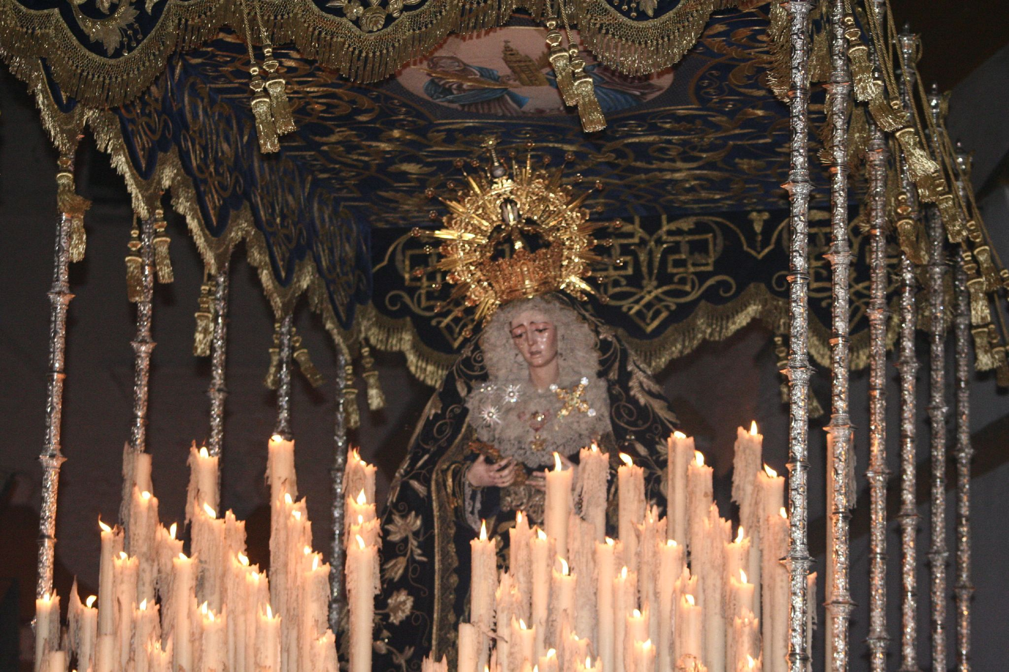 María Santísima de la Estrella. Semana Santa en Sevilla. Año 2006 Foto realizada y propiedad de Ángel Chacón